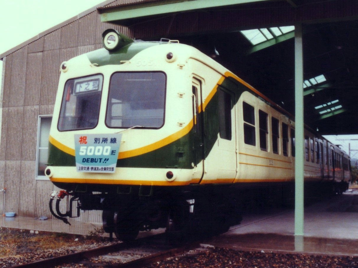 上田交通別所線（当時）下之郷駅に隣接する車庫で翌日の出番を待つデハ5000系電車のクハ5051号とデハ5001のペア。1986年10月1日の同線の昇圧日を翌日に控えた1986年9月30日に投稿者（Bergmann）が銀塩フィルムカメラで撮影したものを、2008年2月26日に投稿者がスキャンの上アップロード。当系列は既に当線からは引退している。また、塗色は上田交通移籍当初のものである。